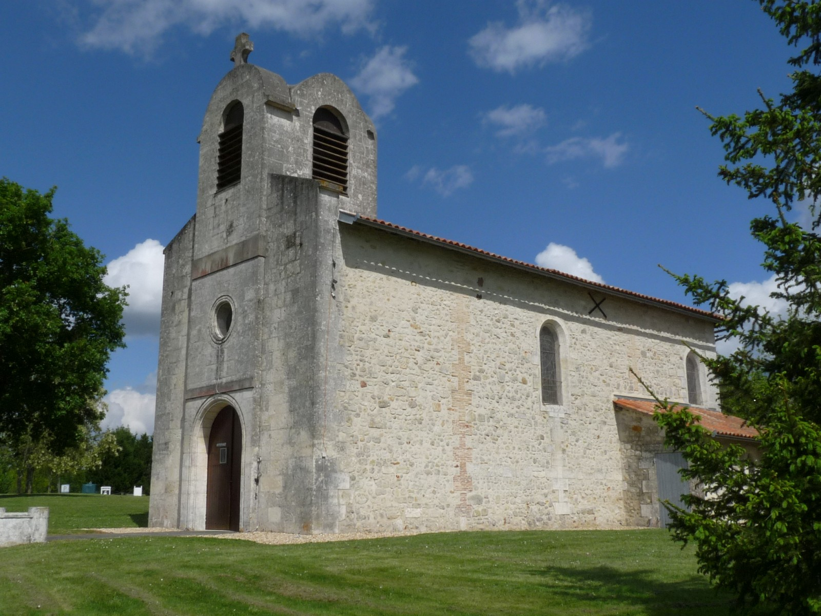 Eglise de Servanches, Dordogne, France